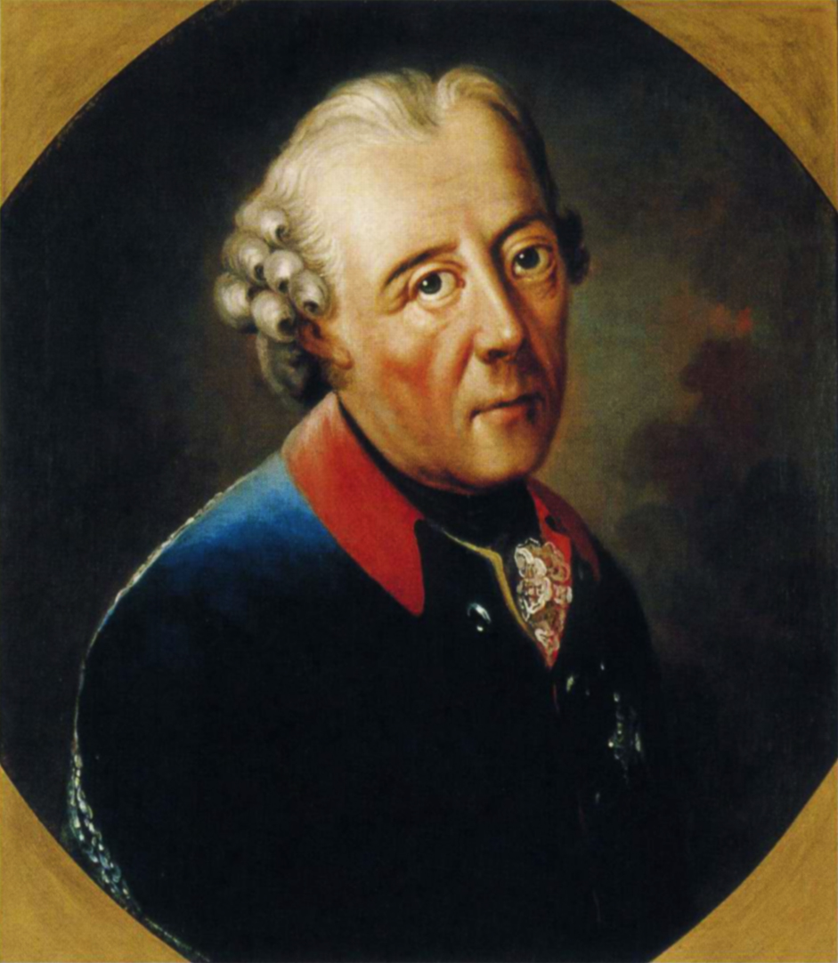 Friedrich II. von Preußen